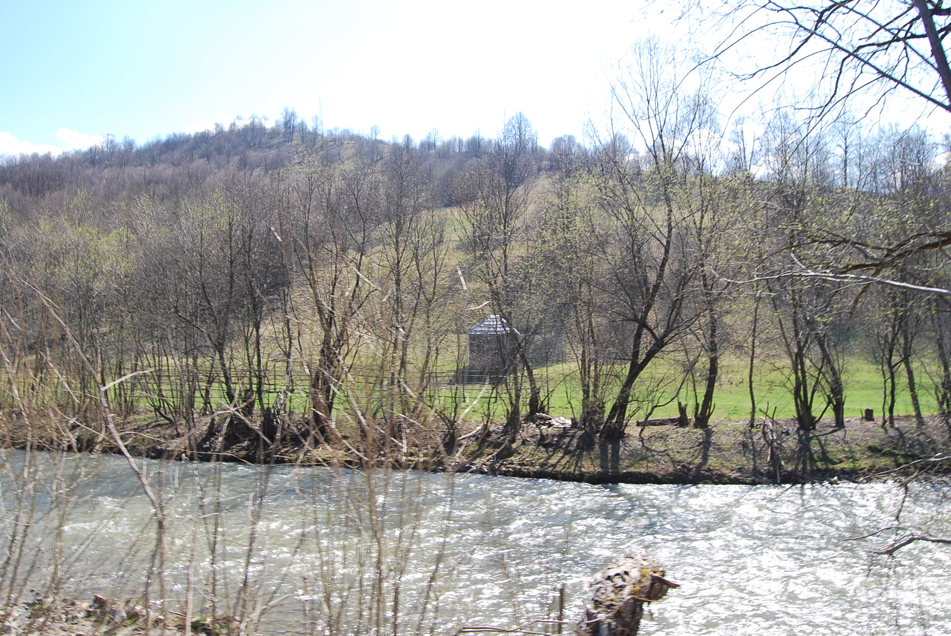 Râul Vișeu, prin Moisei